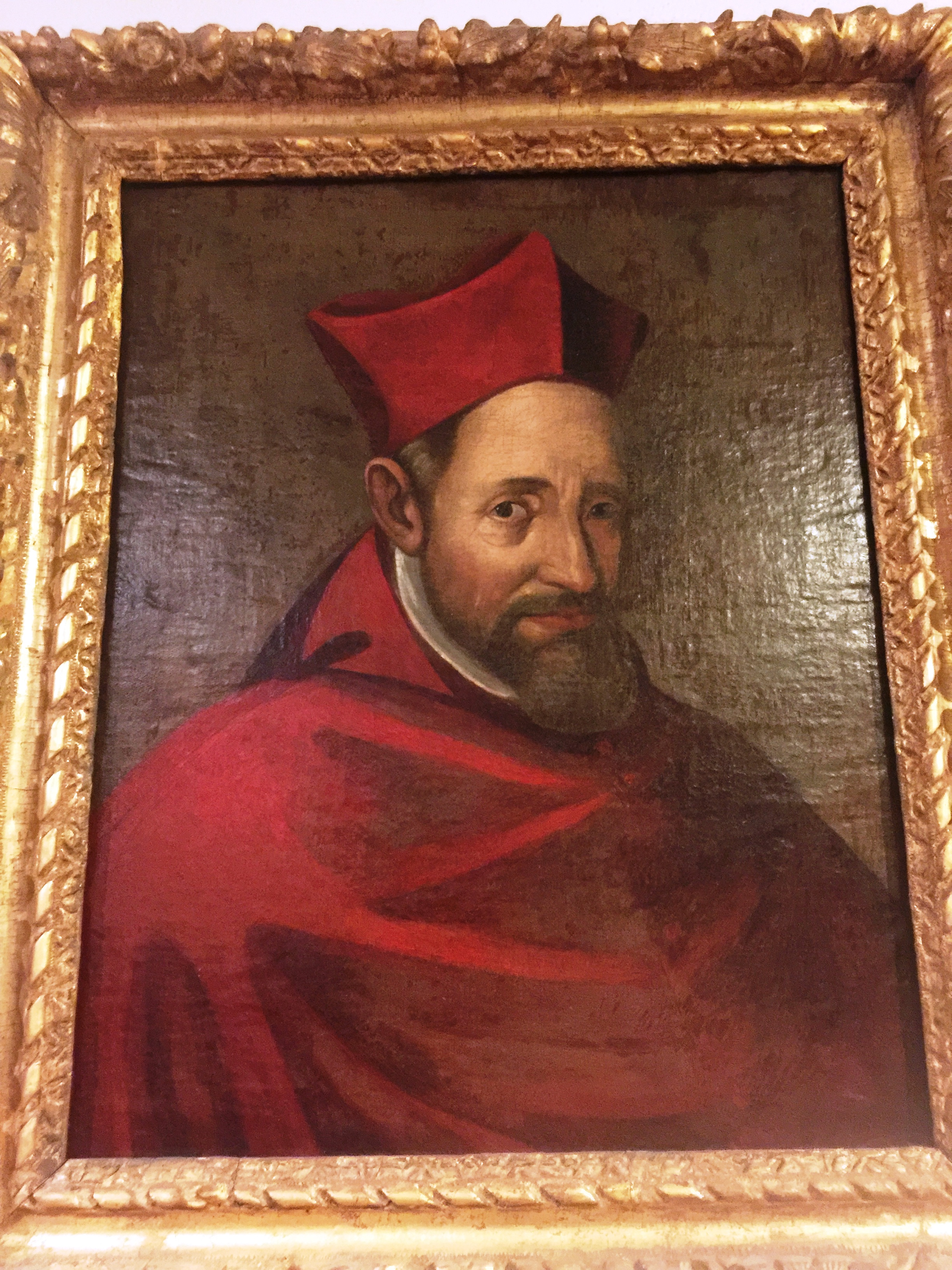 Tableau situé à la Mairie de Joyeuse (Ardèche) . Photo Vincent Auzas.